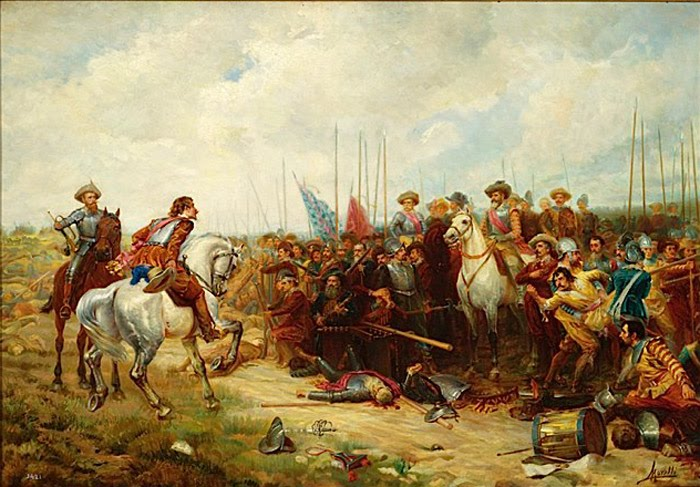 Szene aus der Schlacht bei Rocroi (19. Mai 1643). Weitere Informationen zum Gemälde finden sich hier, einige detailliertere Ansichten auf dieser [1].